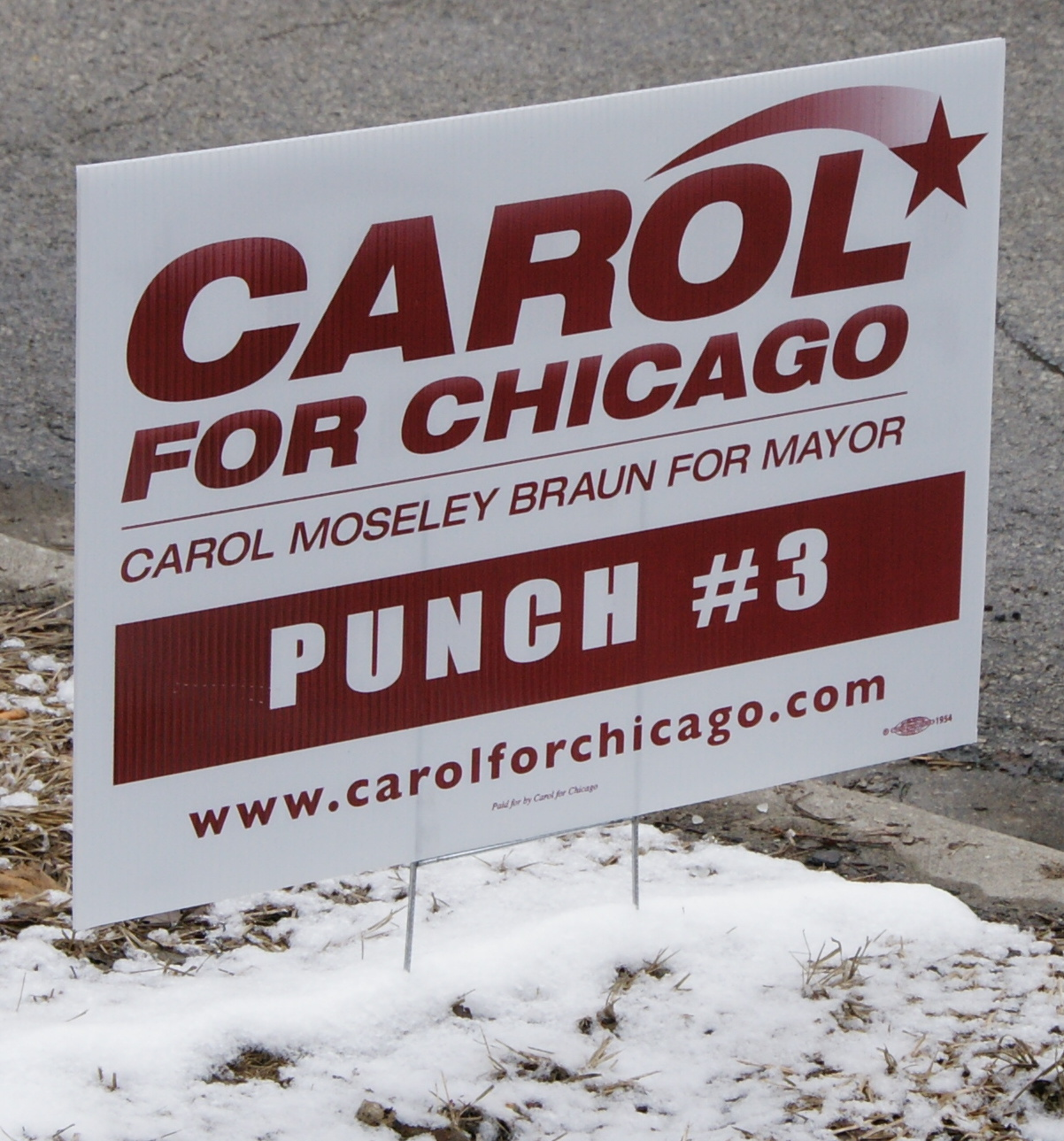 2.22.11 silliness.